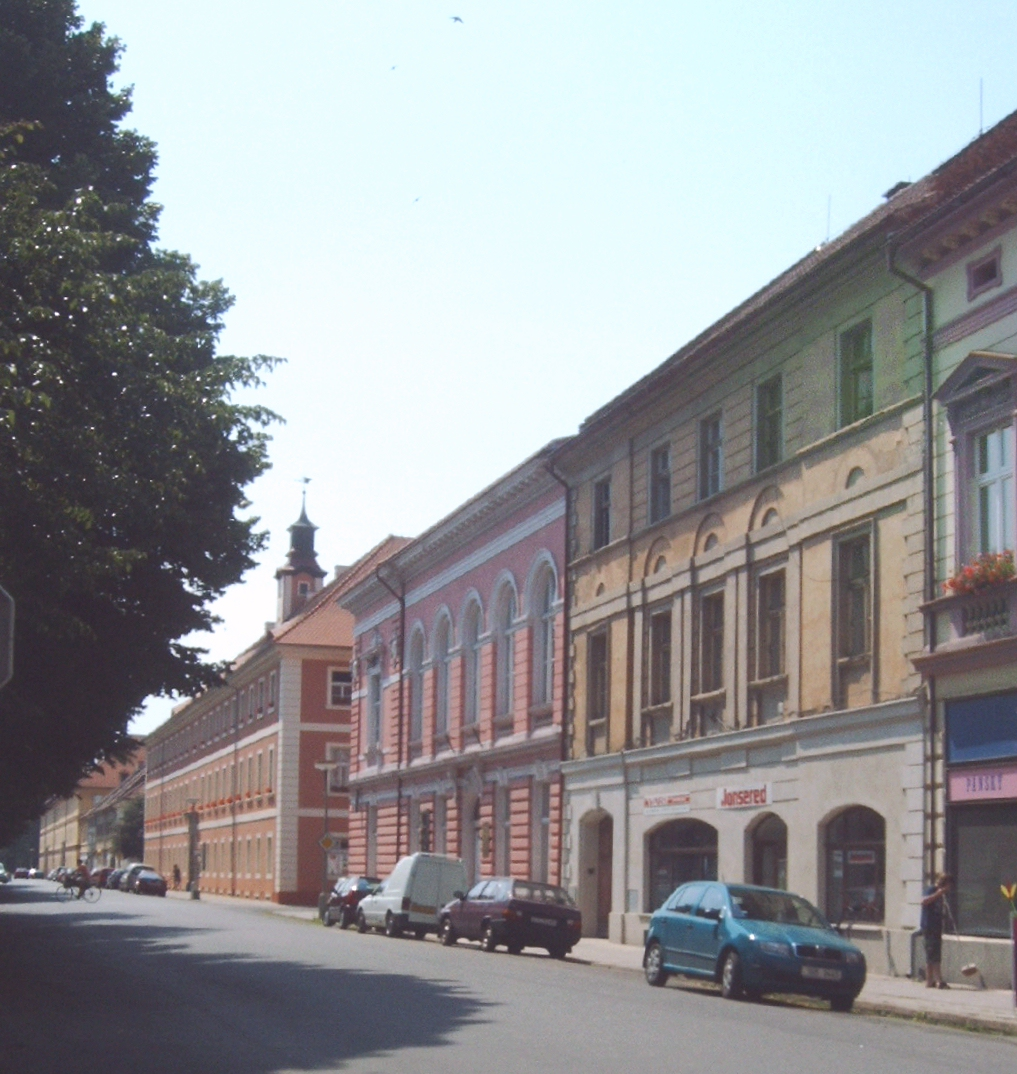 Die "Lange Strasse" in Theresienstadt Aufnahme: August 2005 Url